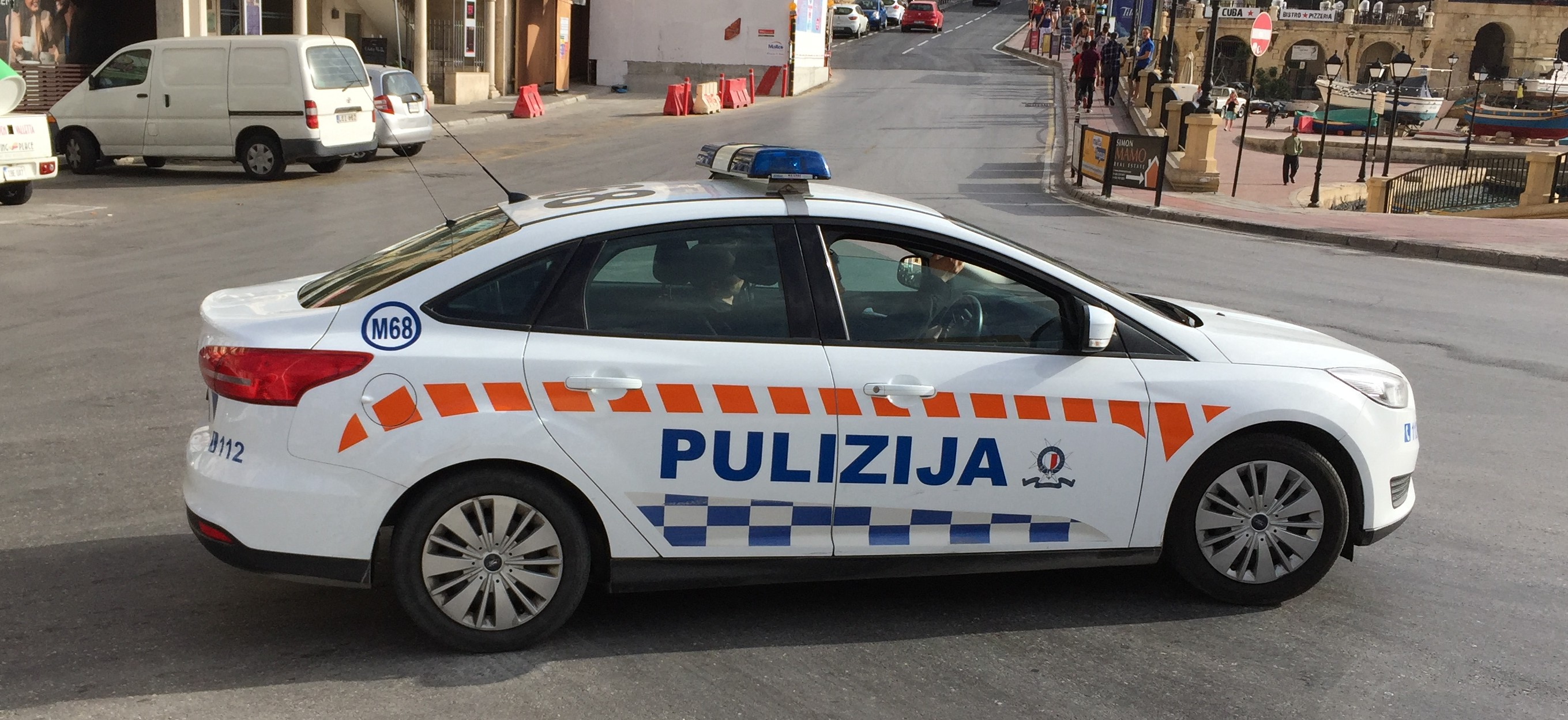 Ford Focus Pulizija